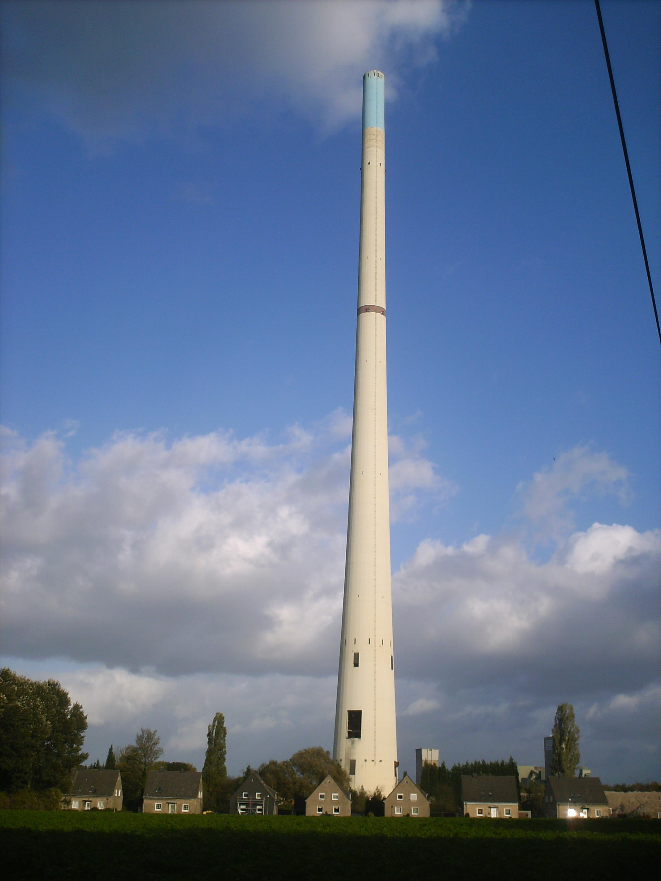 Kamin des einstigen Kraftwerks Westerholt